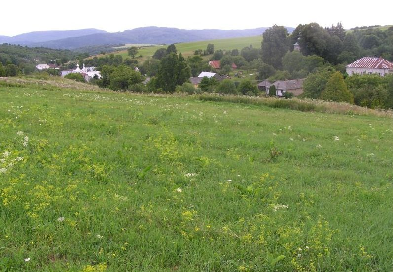 Celkový pohľad